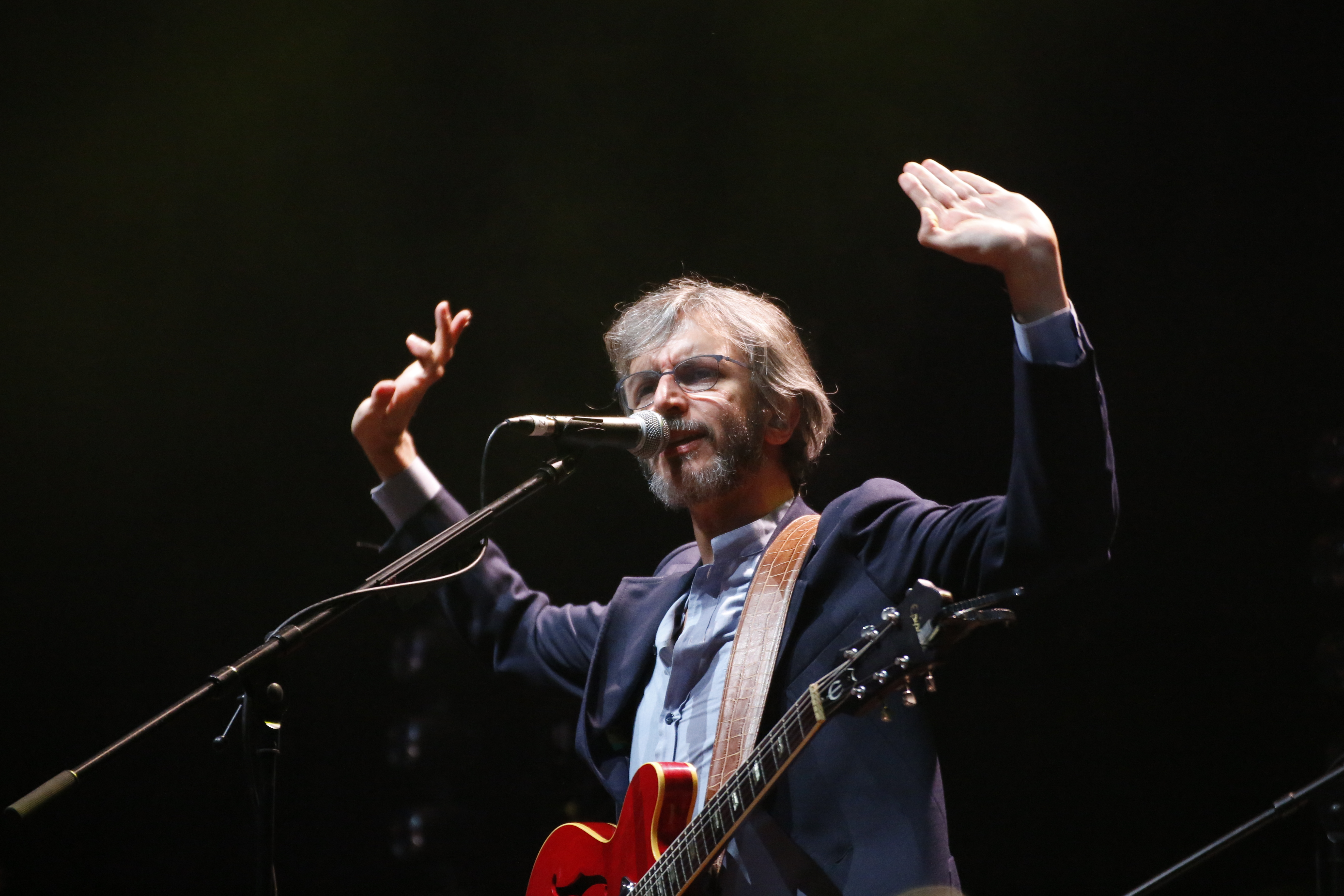 Xoel López en el festival Palencia Sonora 2018.